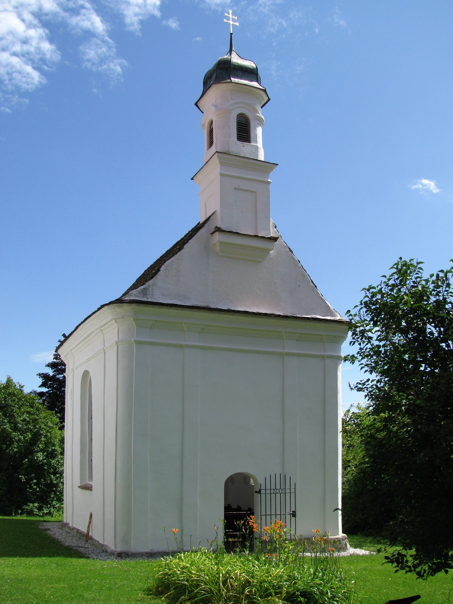 Kapelle Heilig Kreuz von Westen.